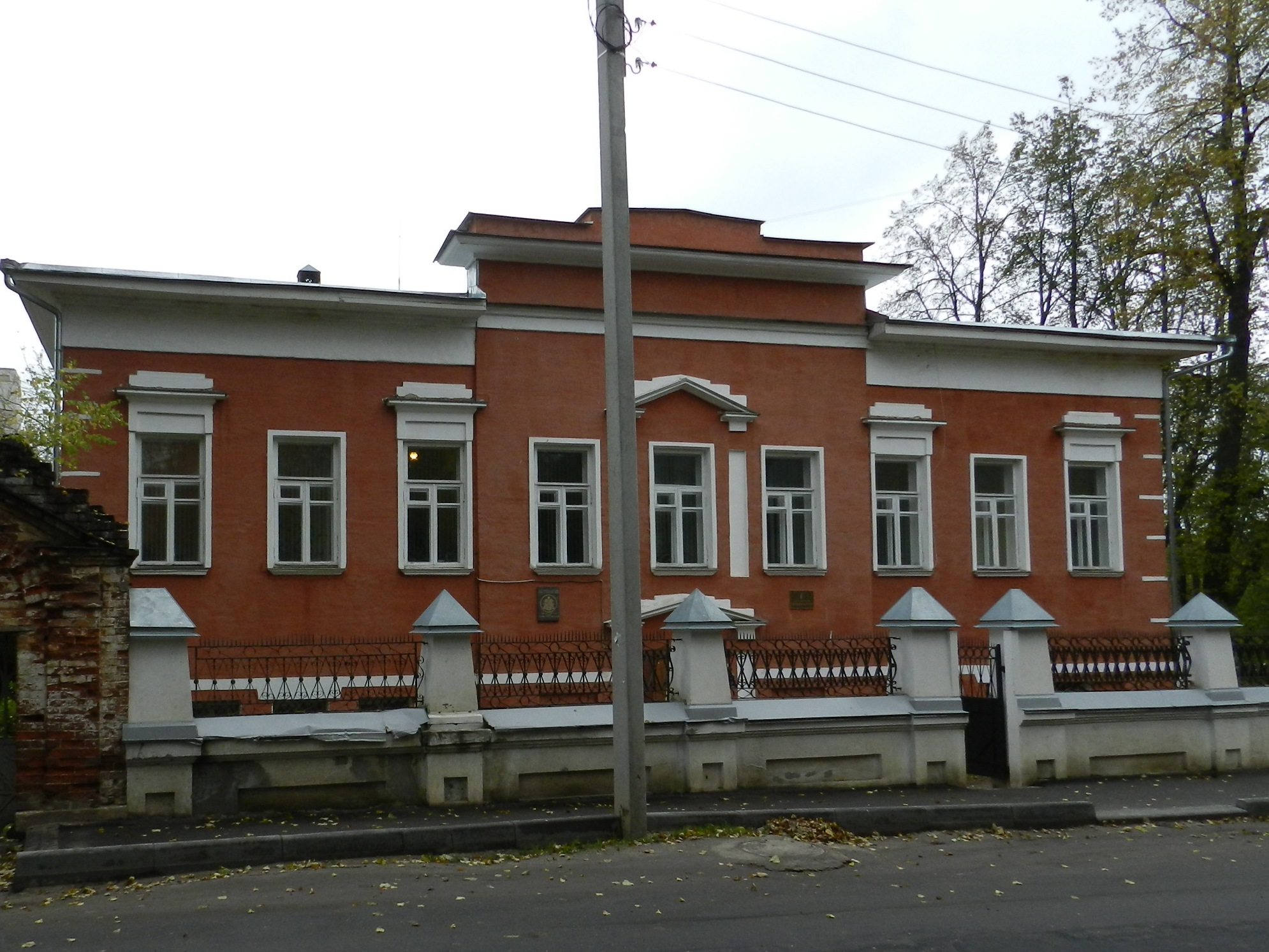 Здание конторы(Ивановская область, Иваново, крутицкая улица, 33)